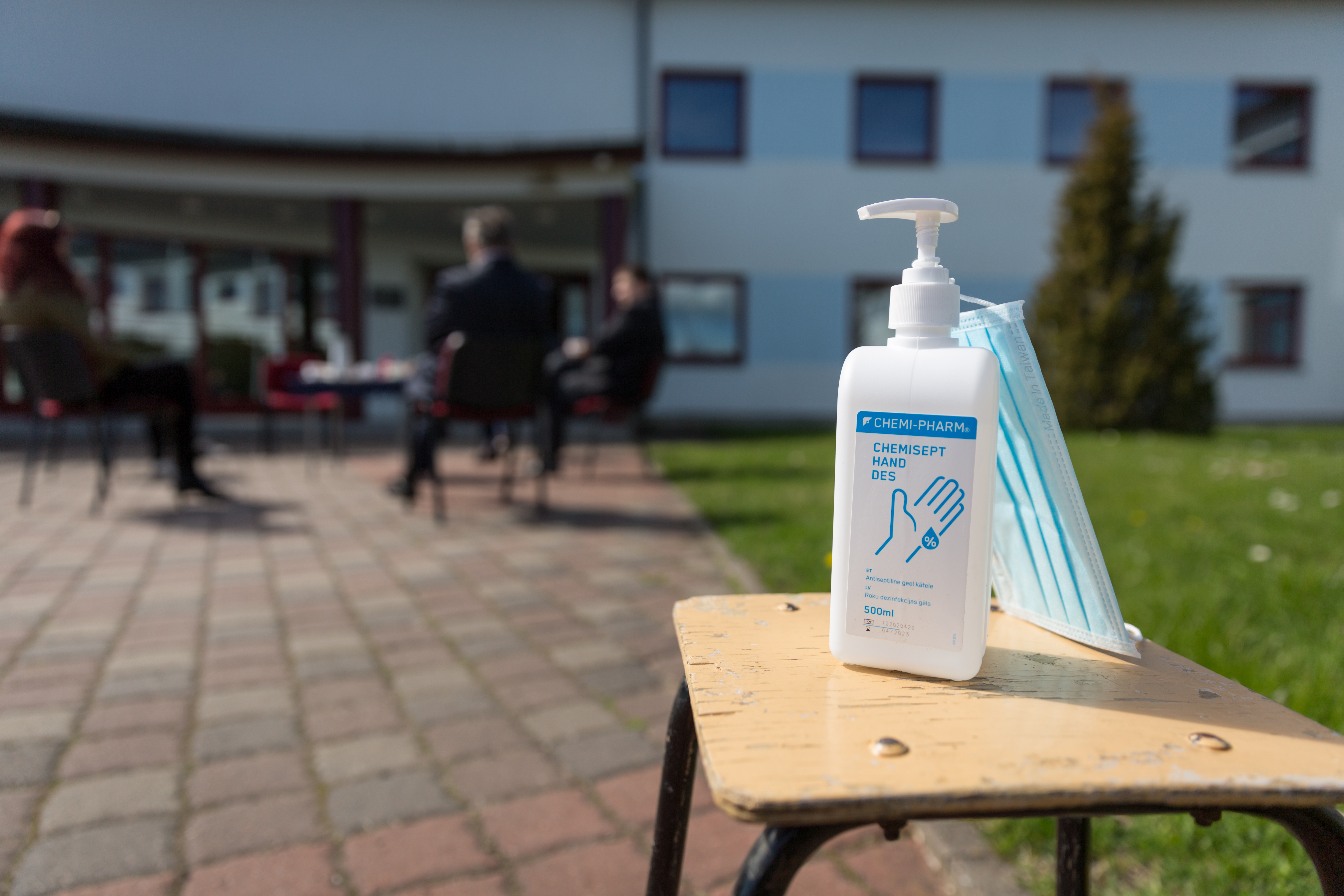 Jüri Ratase Muhu- ja Saaremaa visiit mais 2020.